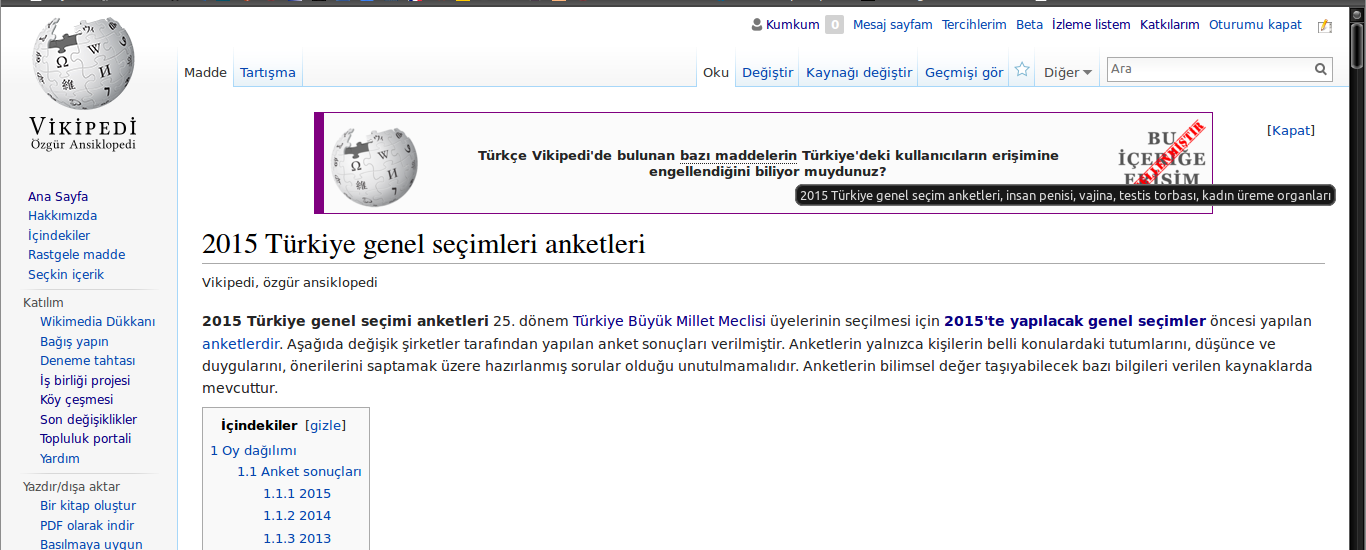 Banière affichée sur la Wikipédia turcophone à partir du 10 juin 2015 en réaction à la censure en Turquie de la page concernant les sondages sur les élections législatives turques de 2015 et d'autes contenus relatifs à la sexualité.